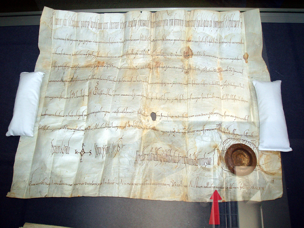 Dokument mit der ersten urkundlichen Erwähnung Lustenaus